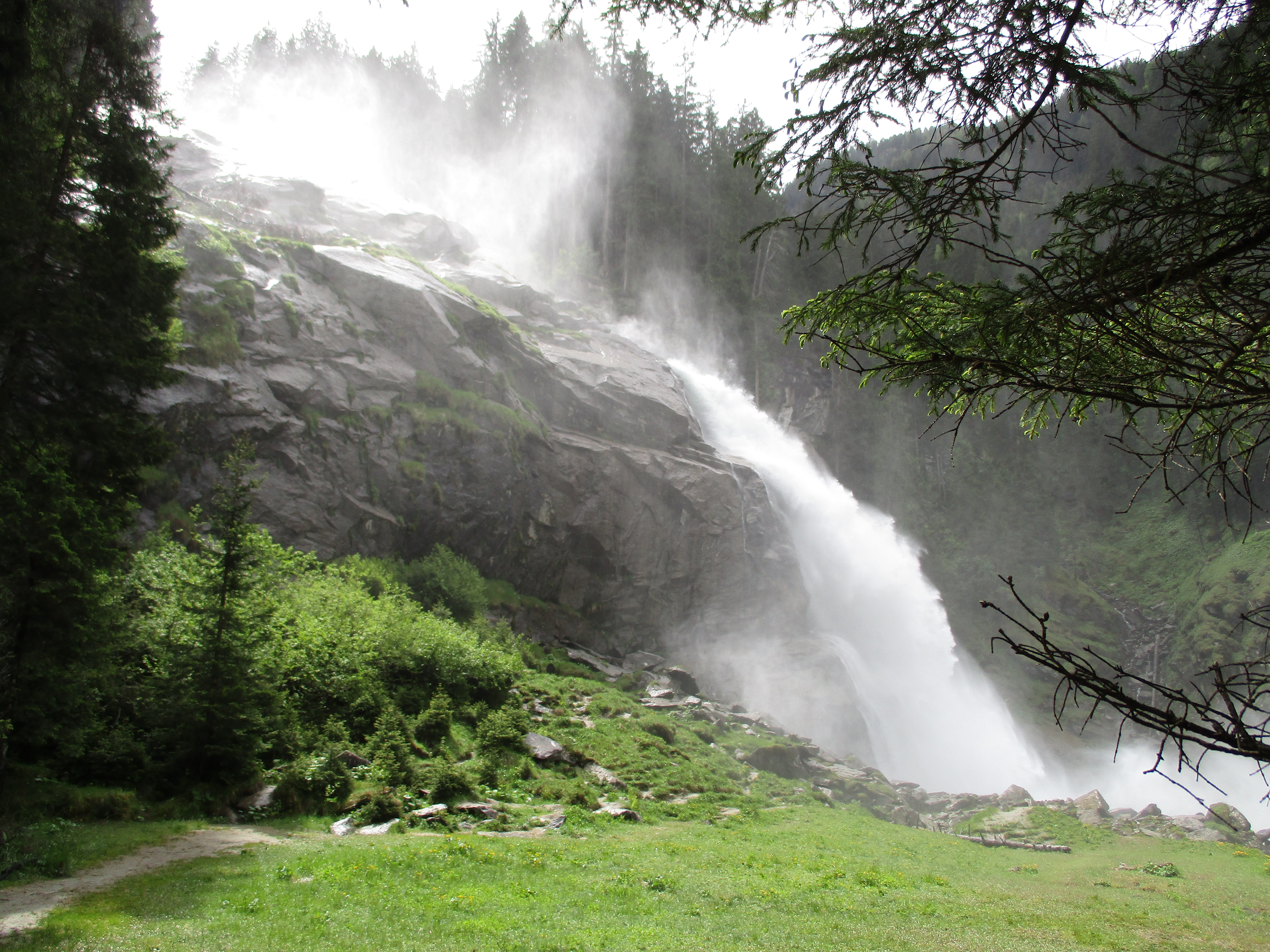 Krimml, Unterer Wasserfall